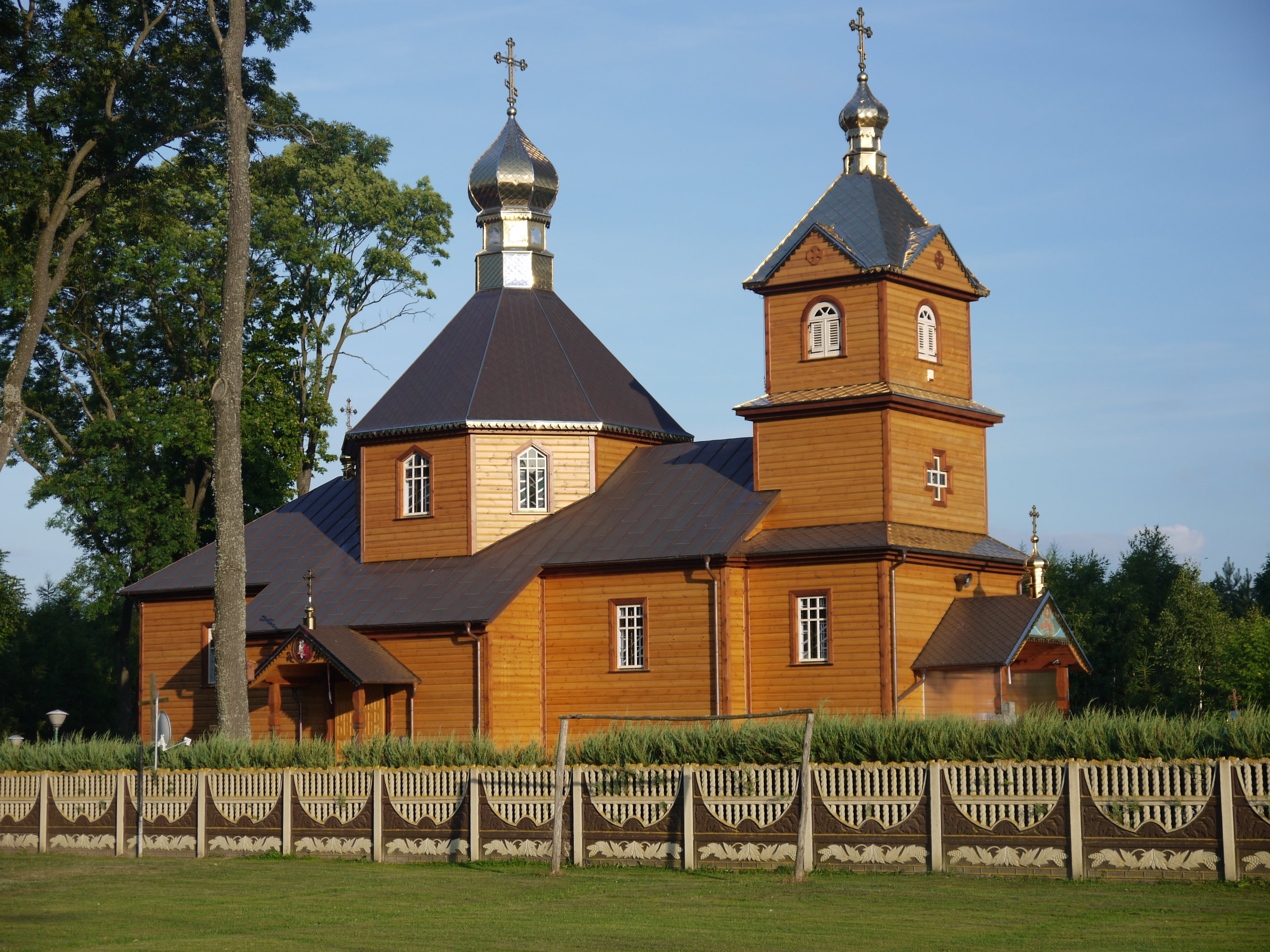 cerkiew widok po remoncie